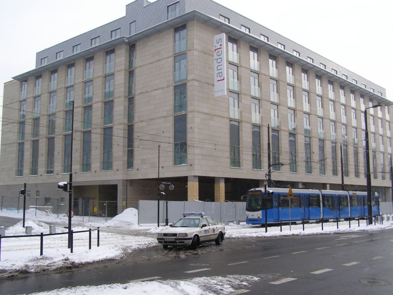 Andel's Hotel Cracow